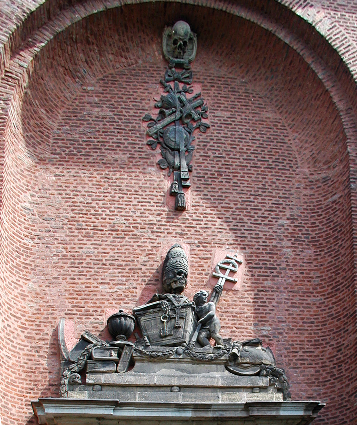 Sankt Gregorius im Elend, Köln. Reliefauschnitt der Portalseite